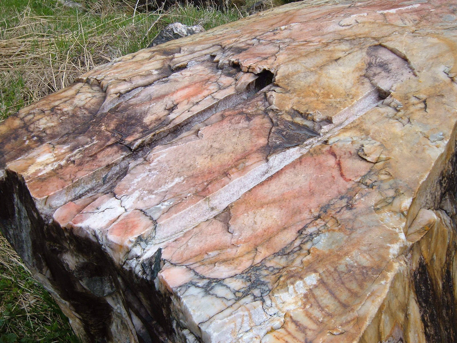 Блок мрамора со следами шпуров, извлечённый из карьера Ороктойского мраморного месторождения.